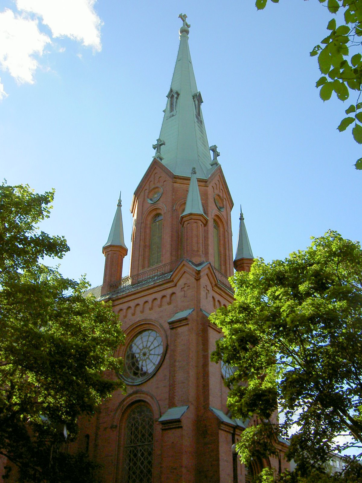 Alexander Church in Tampere, Finland